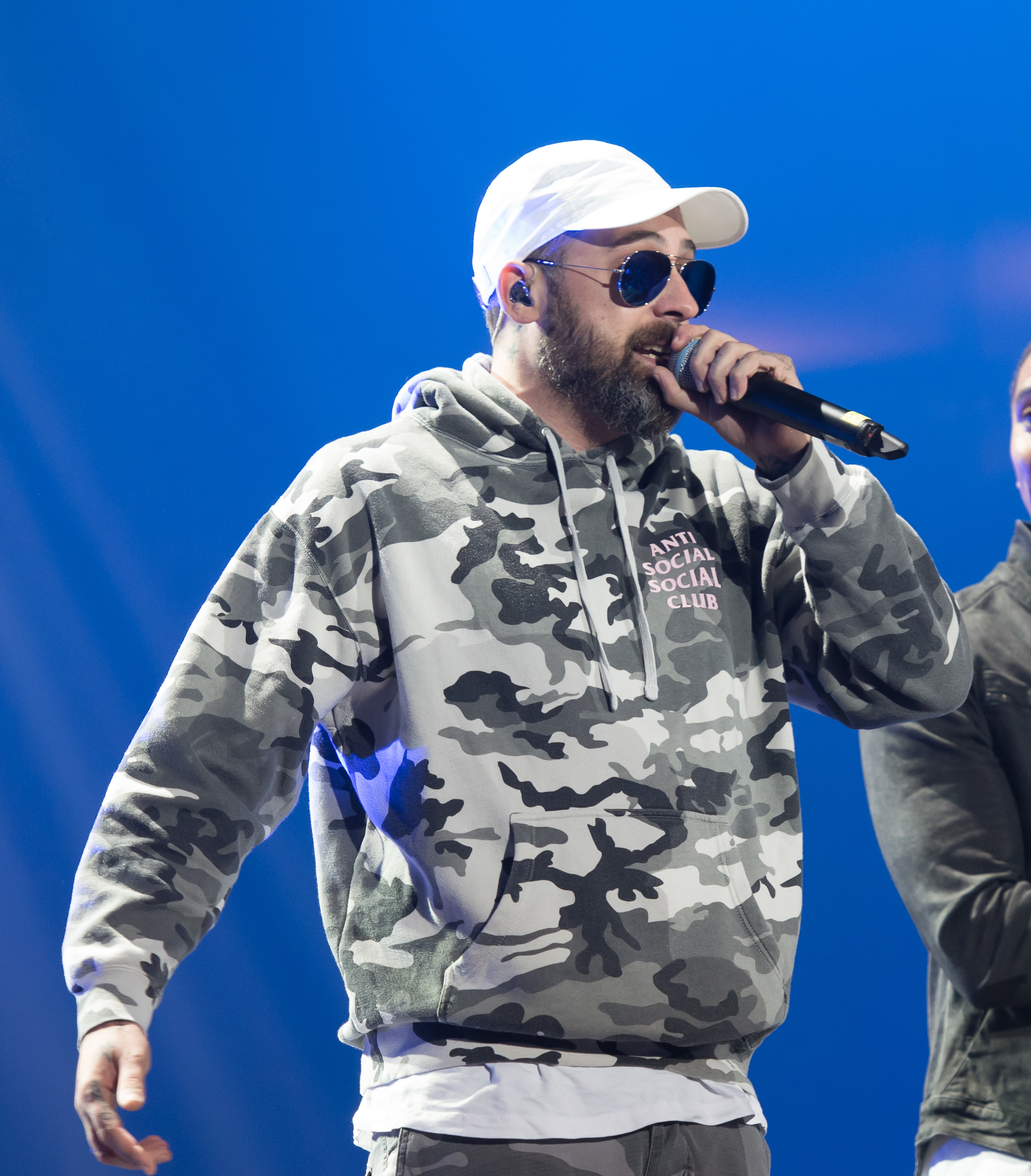 Sido beim Global Citizen Festival in Hamburg